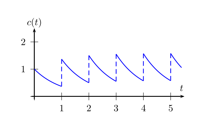 Gráfico